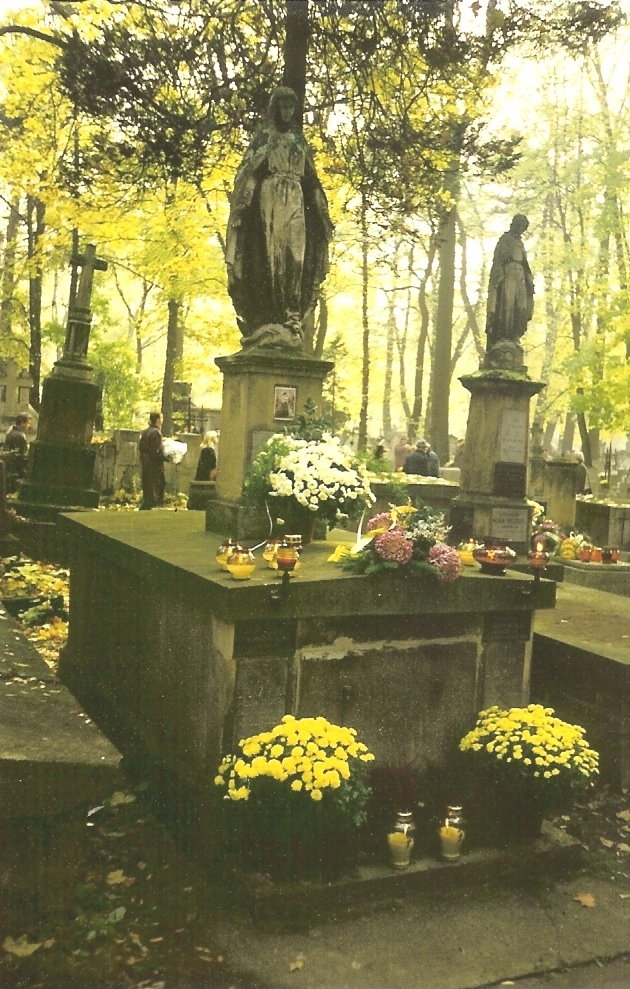 Grobowiec prezesa TPSP, Kazimierza Nowackiego